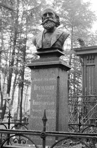 Надгробие Луиджи Премацци было установлено на его могиле на Выборгском римско-католическое кладбище Санкт-Петербурга. В 1940 году могила и ее надгробие были перенесены на Тихвинское кладбище (Некрополь мастеров искусств) Александро-Невской лавры.